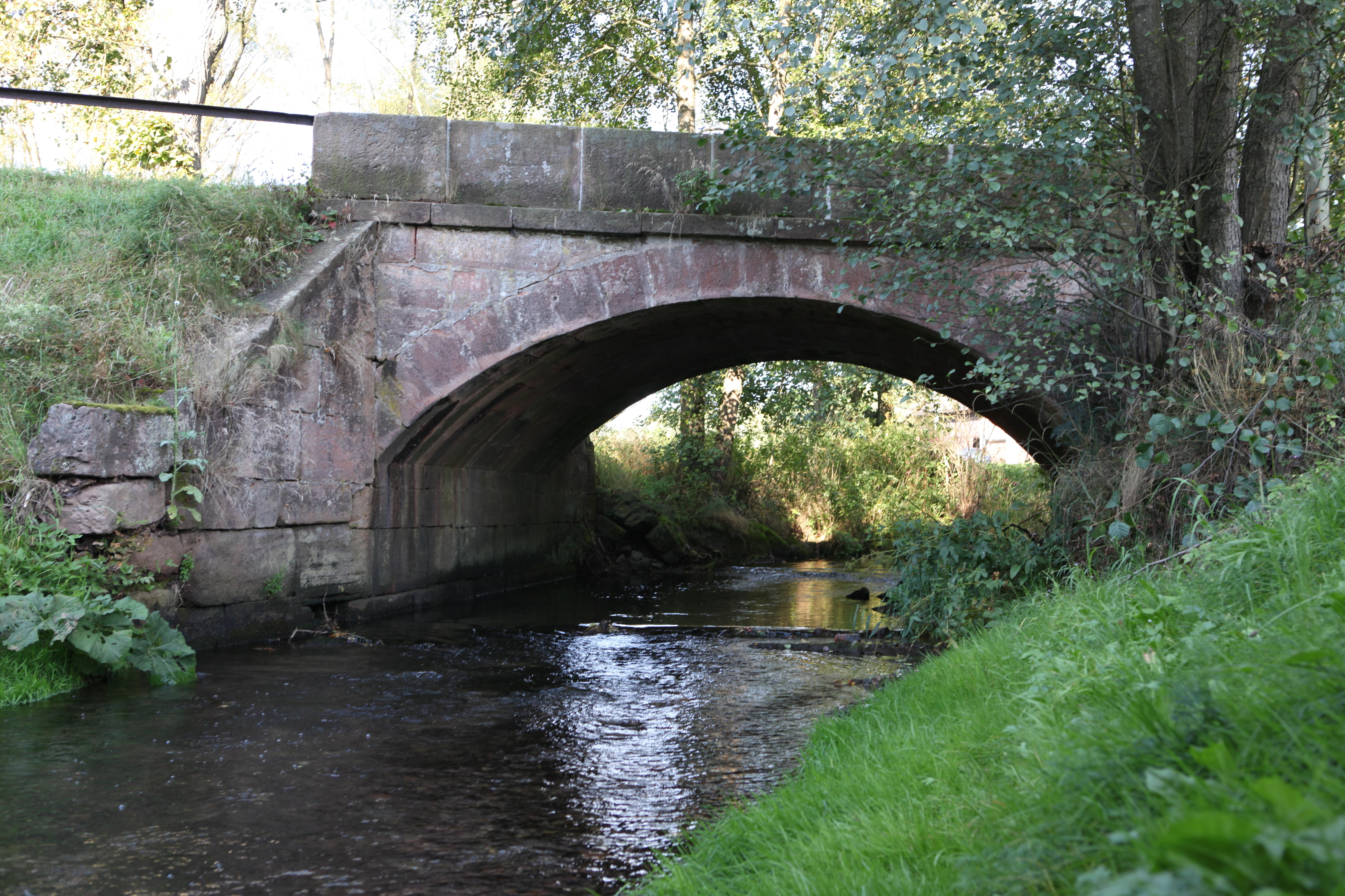 Effelderbrücke 1891, in Döhlau, OT von Frankenblick, Thüringen